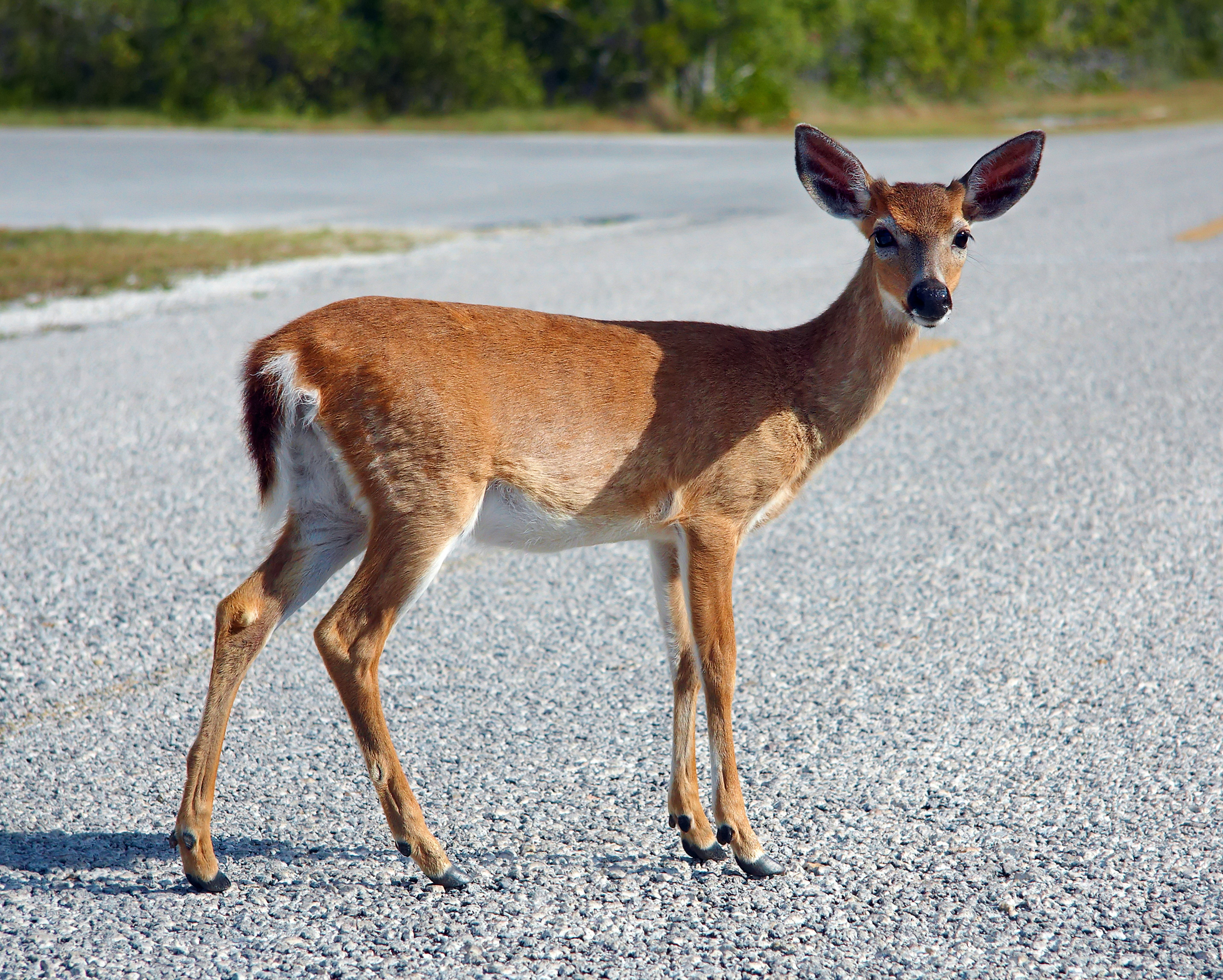 Key Deer on Deer Key